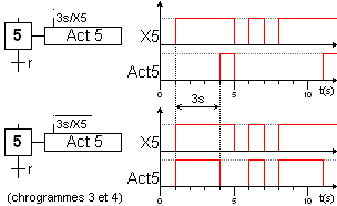 diagrame temporel pour explique l'action retardée d'un Grafcet.